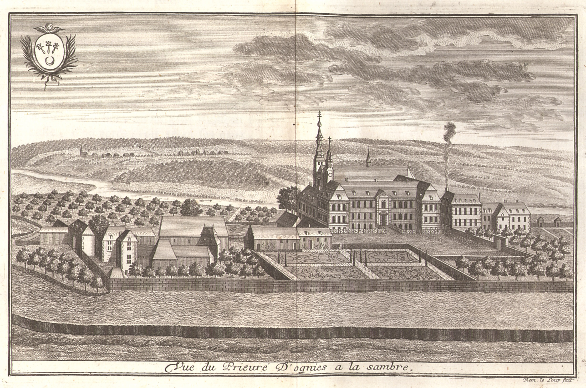 De priorij van Oignies tijdens de 18e eeuw - door Remacle Leloup (1694-1746)